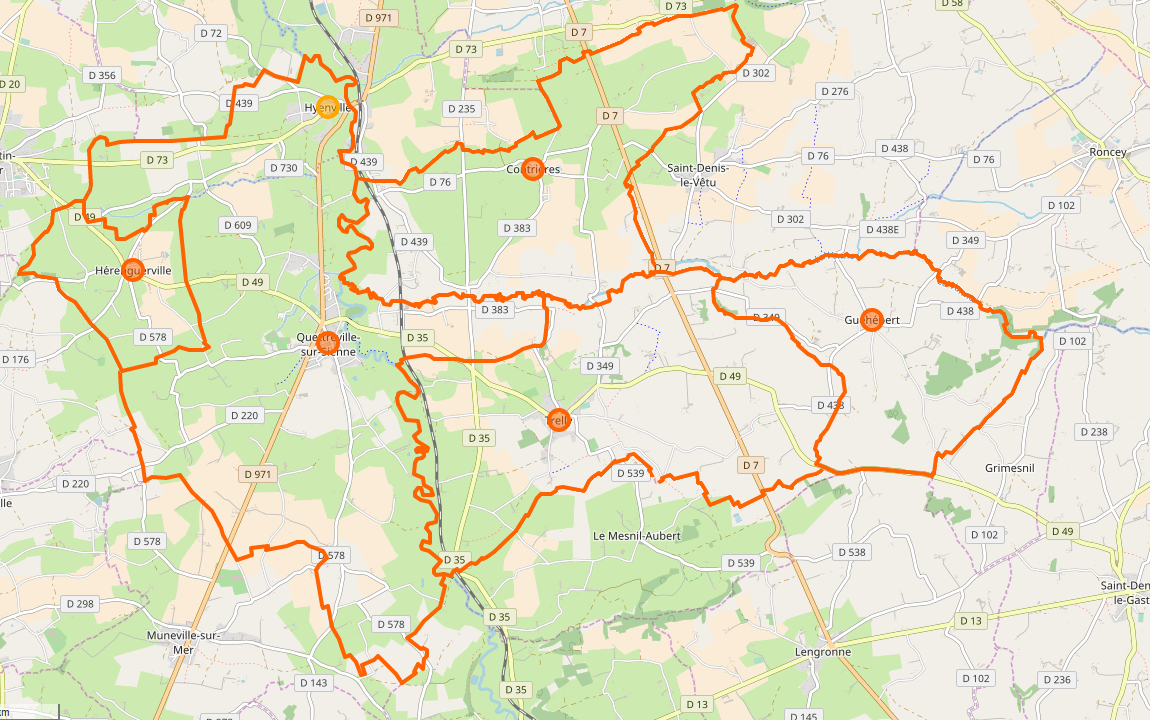 Carte de la commune nouvelle et de ses communes déléguées en 2019